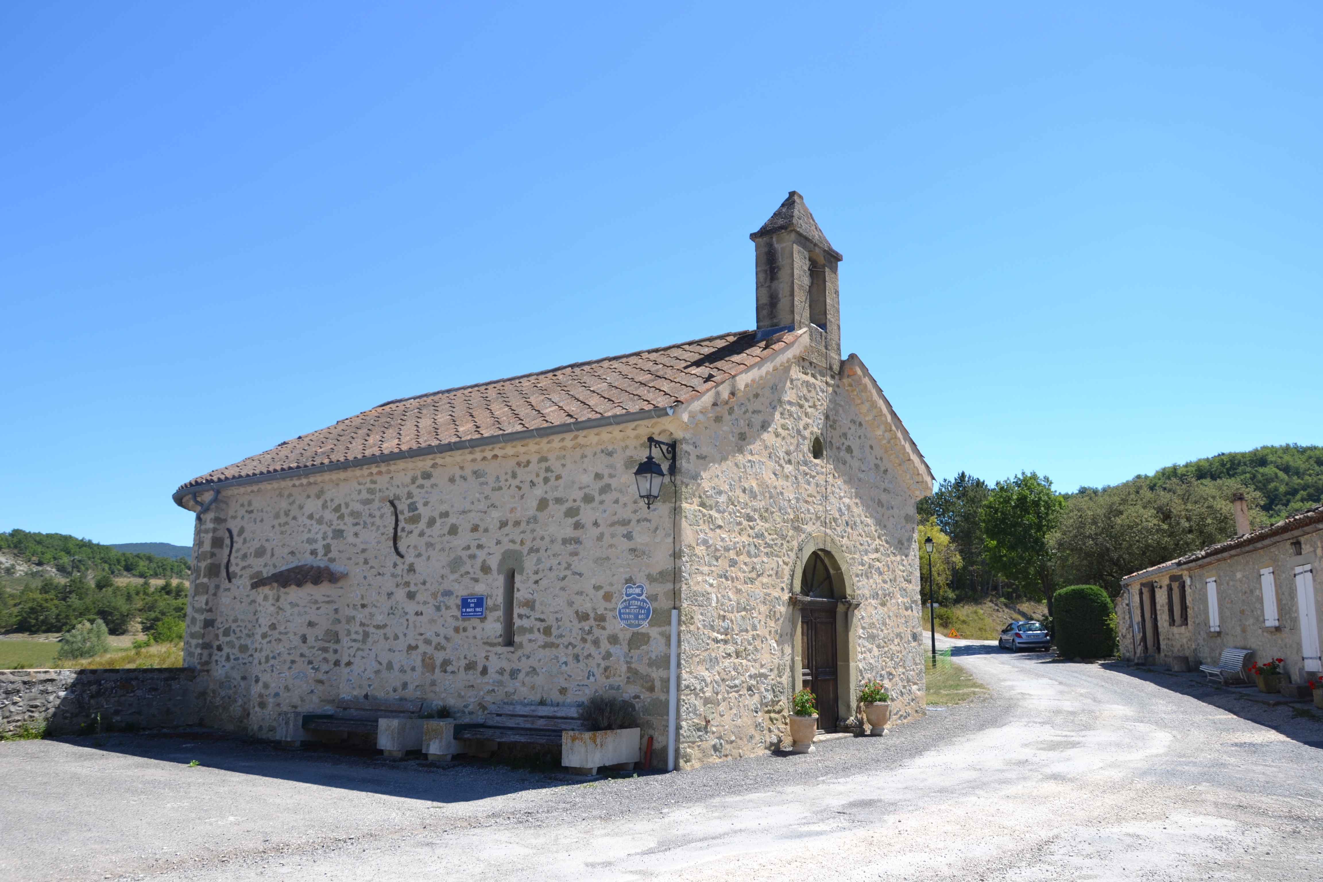 église de Montferrand-la-Fare